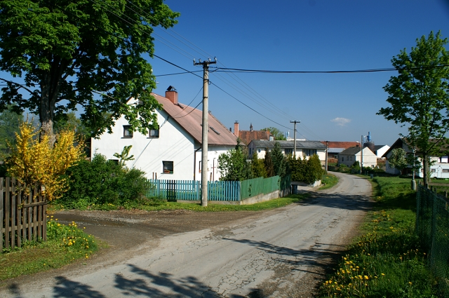 poznáváme obec Lhotku